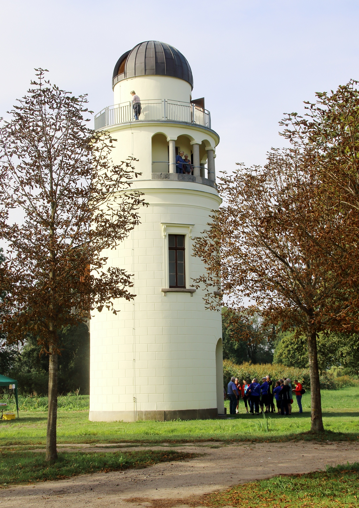 Restaurierter Turm der ehemaligen Sternwarte Remplin bei Malchin